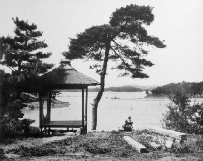 山口県宇部市。常盤湖。1926年（大正15年）撮影。